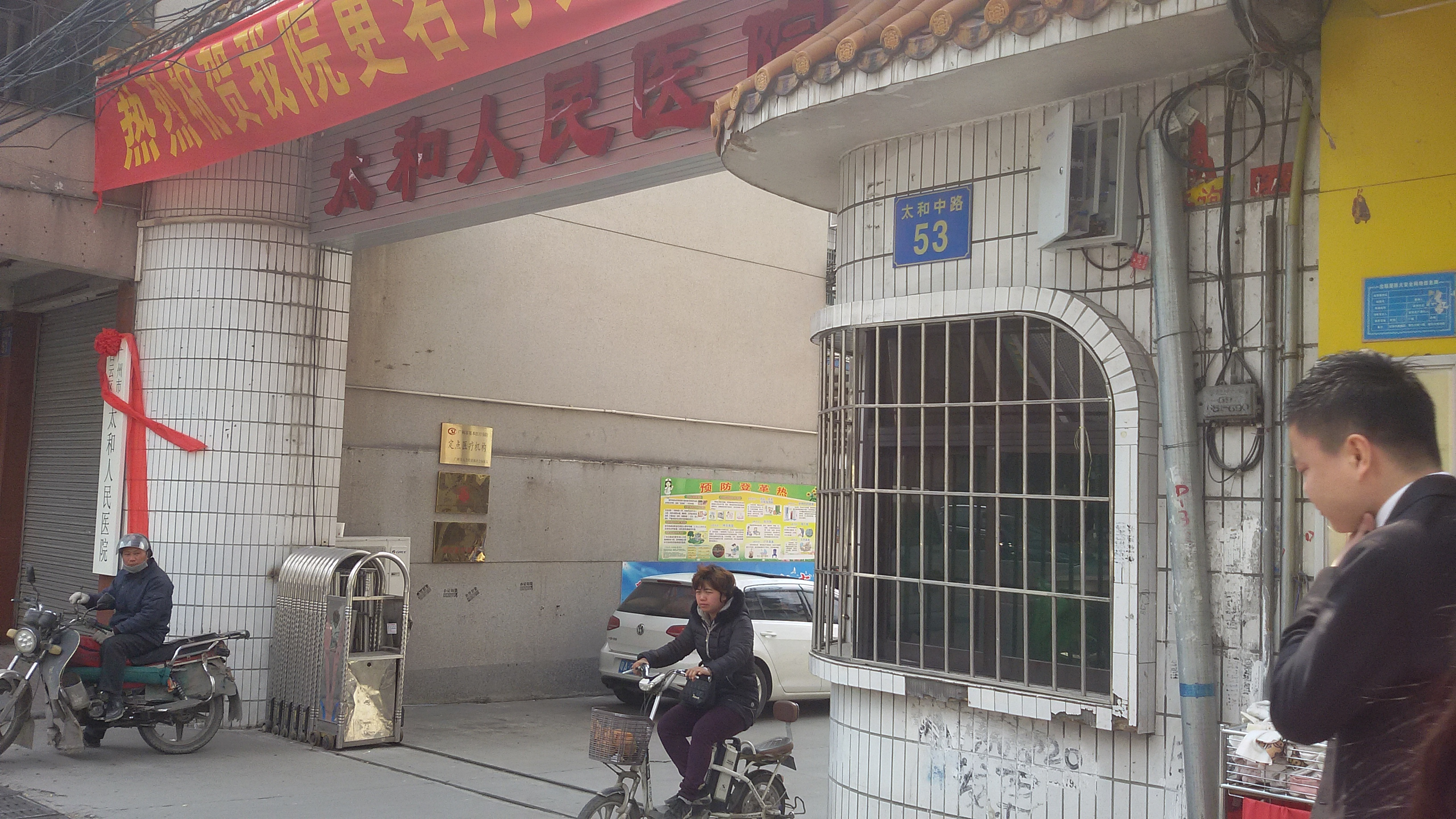 粵語: 太和人民医院